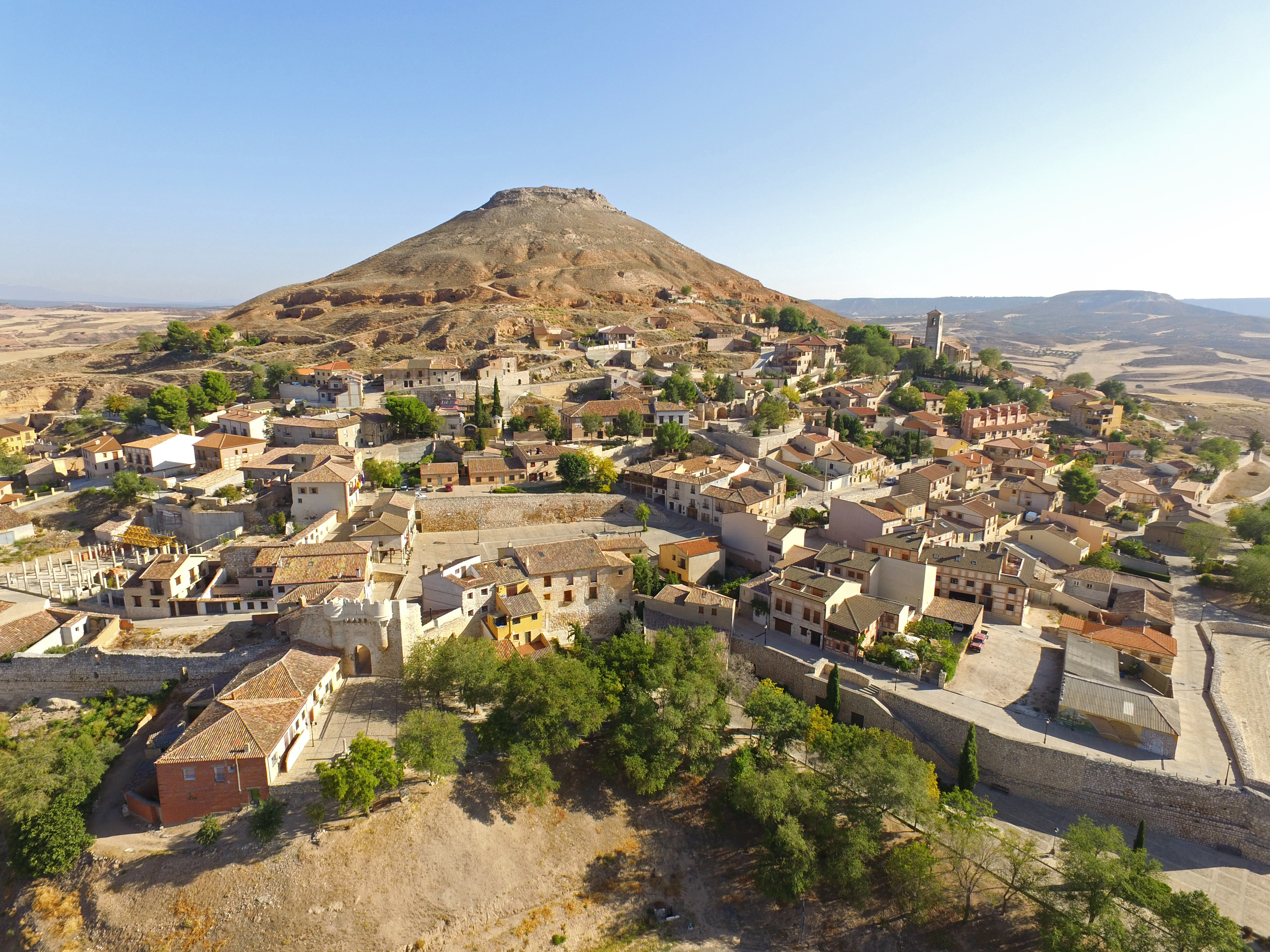 Vista aérea desde las eras de la carretera.